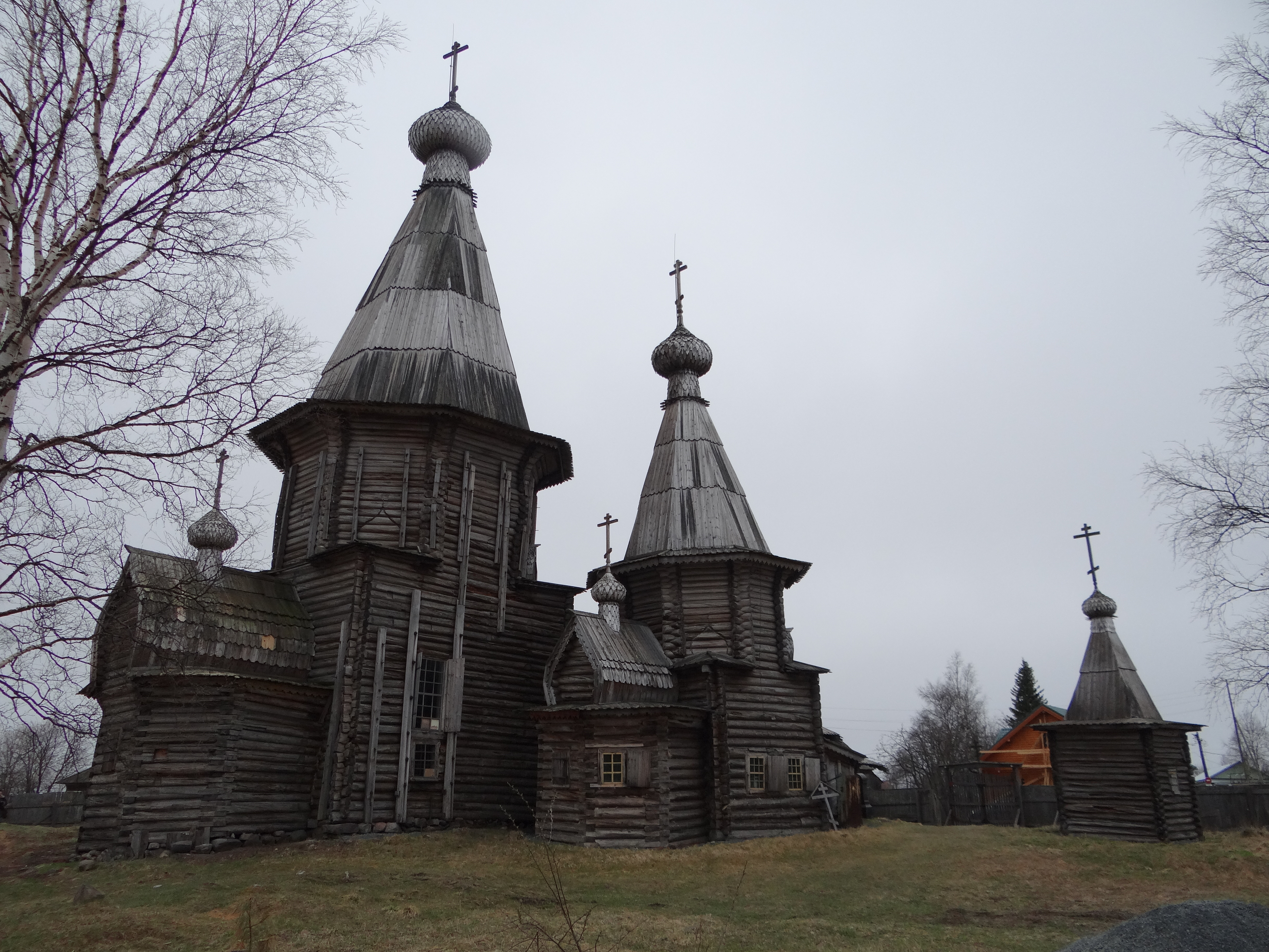 (Республика Карелия, Кемь, Вицупа улица)